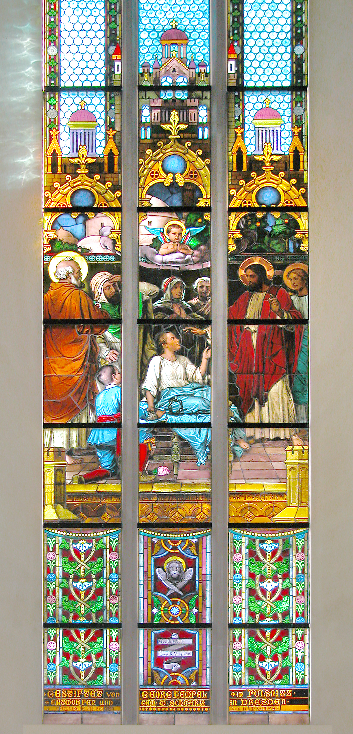 18.05.2007 01896 Pulsnitz, Kirchplatz: St. Nikolai Kirche. Chorfenster rechts. [DSCN28025.TIF]20070518335DR.JPG(c)Blobelt Glasgemälde: Die Erweckung der zwölfjährigen Tochter des Jaïrus („Jairi Töchterlein“) von Franz Wenzel Schwarz (1842–1919) aus Dresden. Beschriftung (unten): Gestiftet von Georg Hempel († in Pulsnitz) – Entworfen und gem. F. Schwarz in Dresden – Technische Arbeiten von O. Protze.